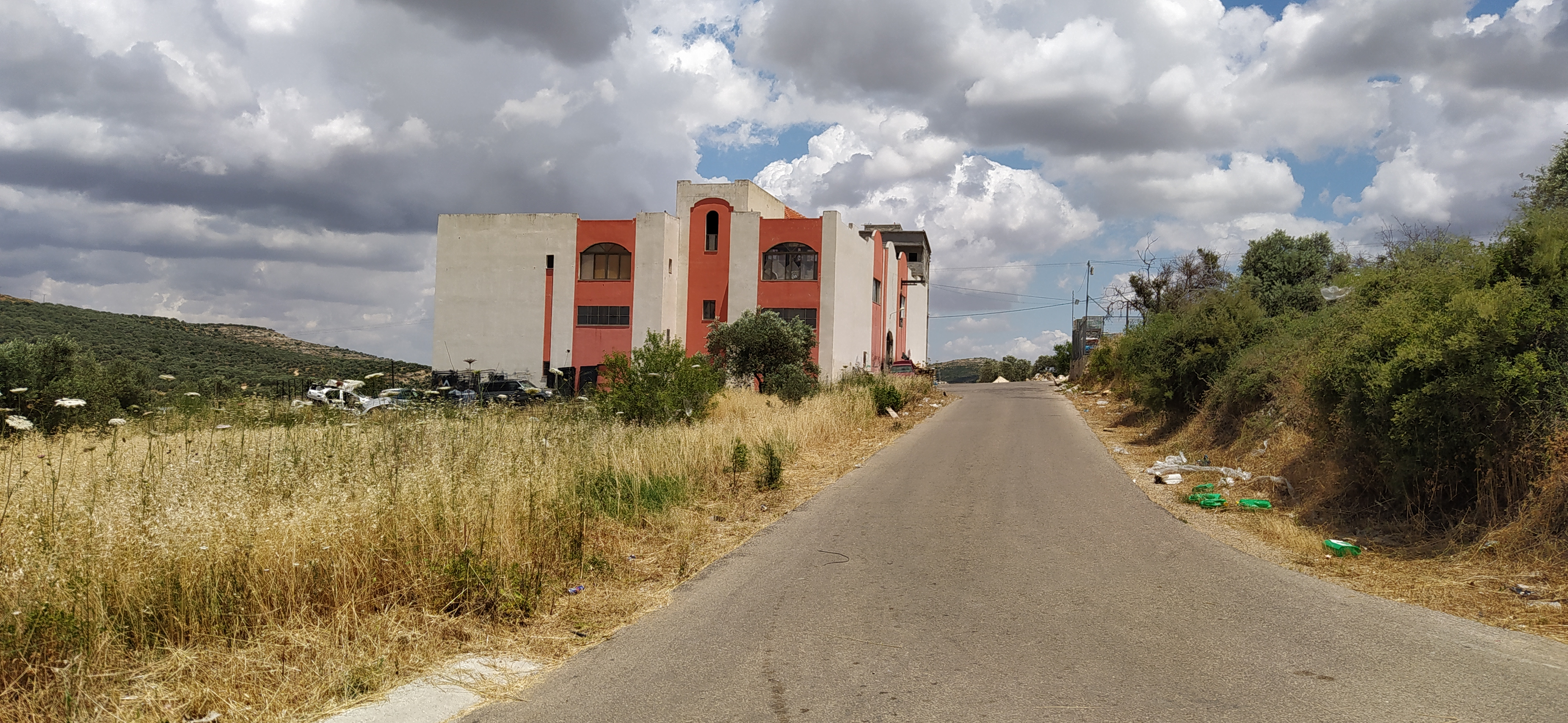 مجمع الحرف والمهن التابع لبلدية سلفيت في المنطقة الصناعية بمدينة سلفيت، دولة فلسطين